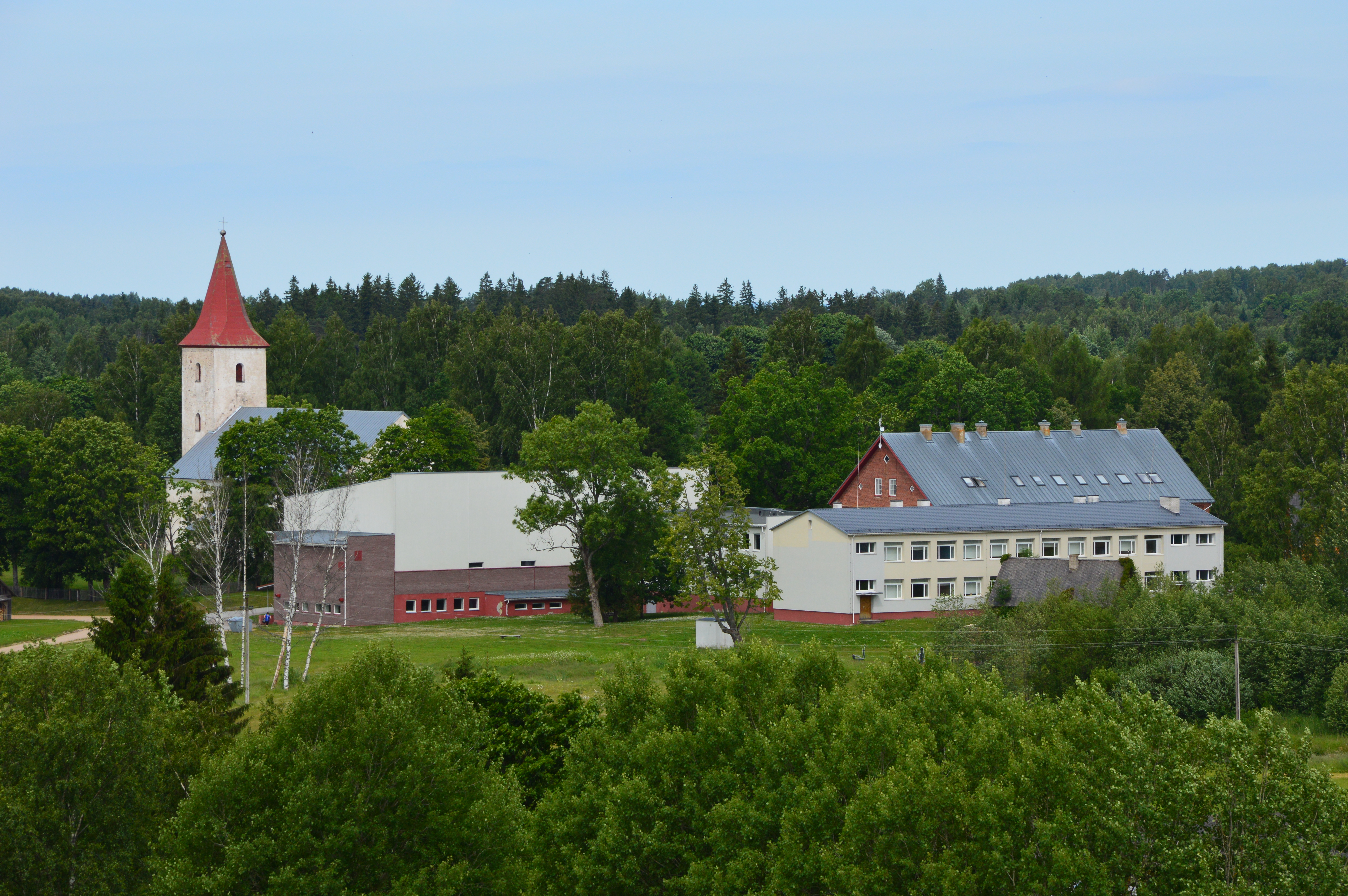 Rõuge kirik ja kool.